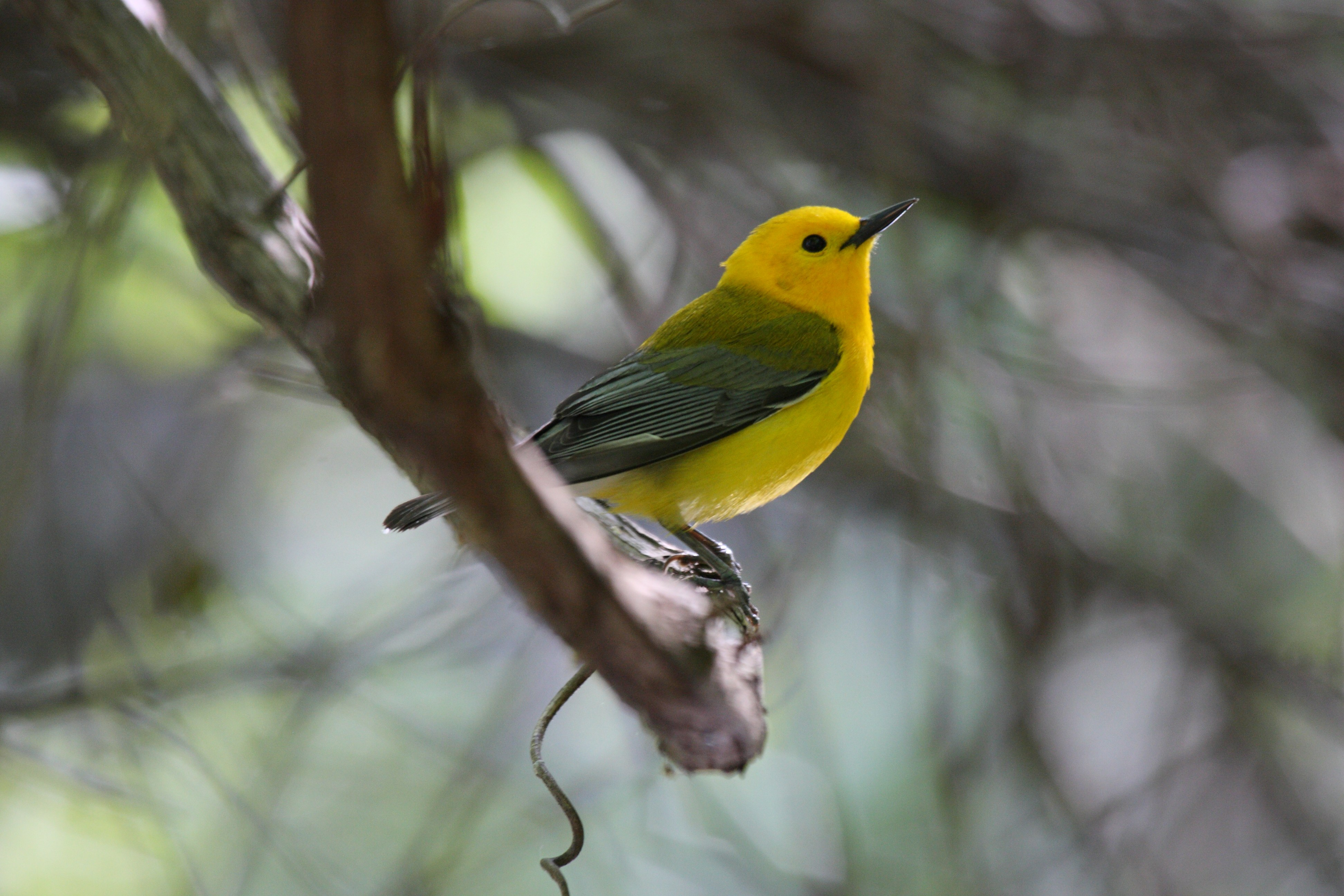 Protonotaria citrea, male